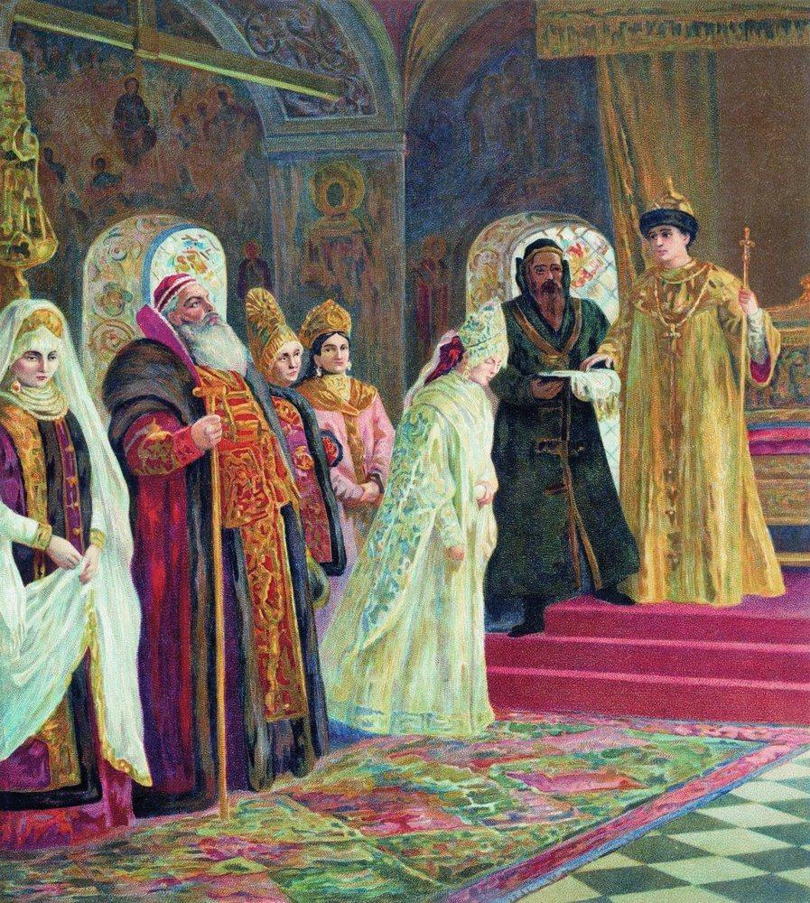 Константин Егорович Маковский «Выбор невесты царем Алексеем Михайловичем»